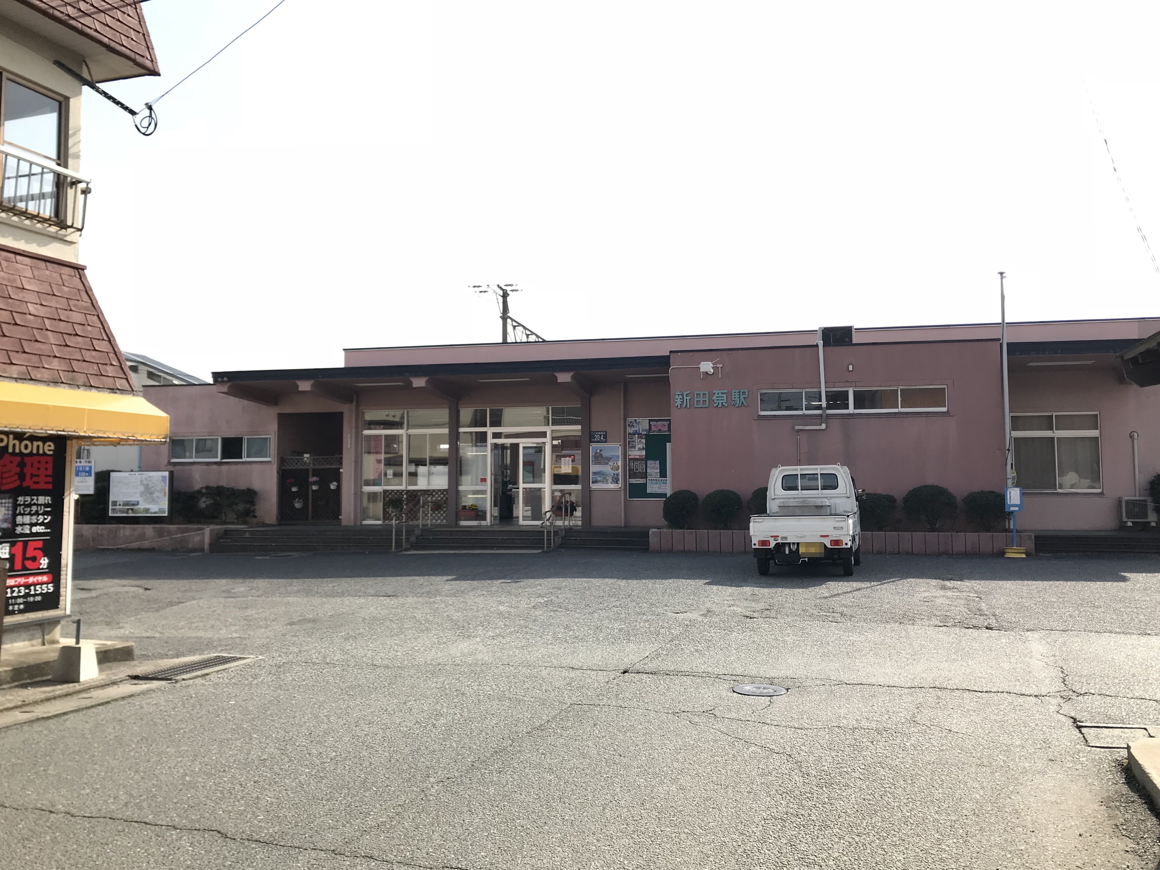 新田原駅の駅舎